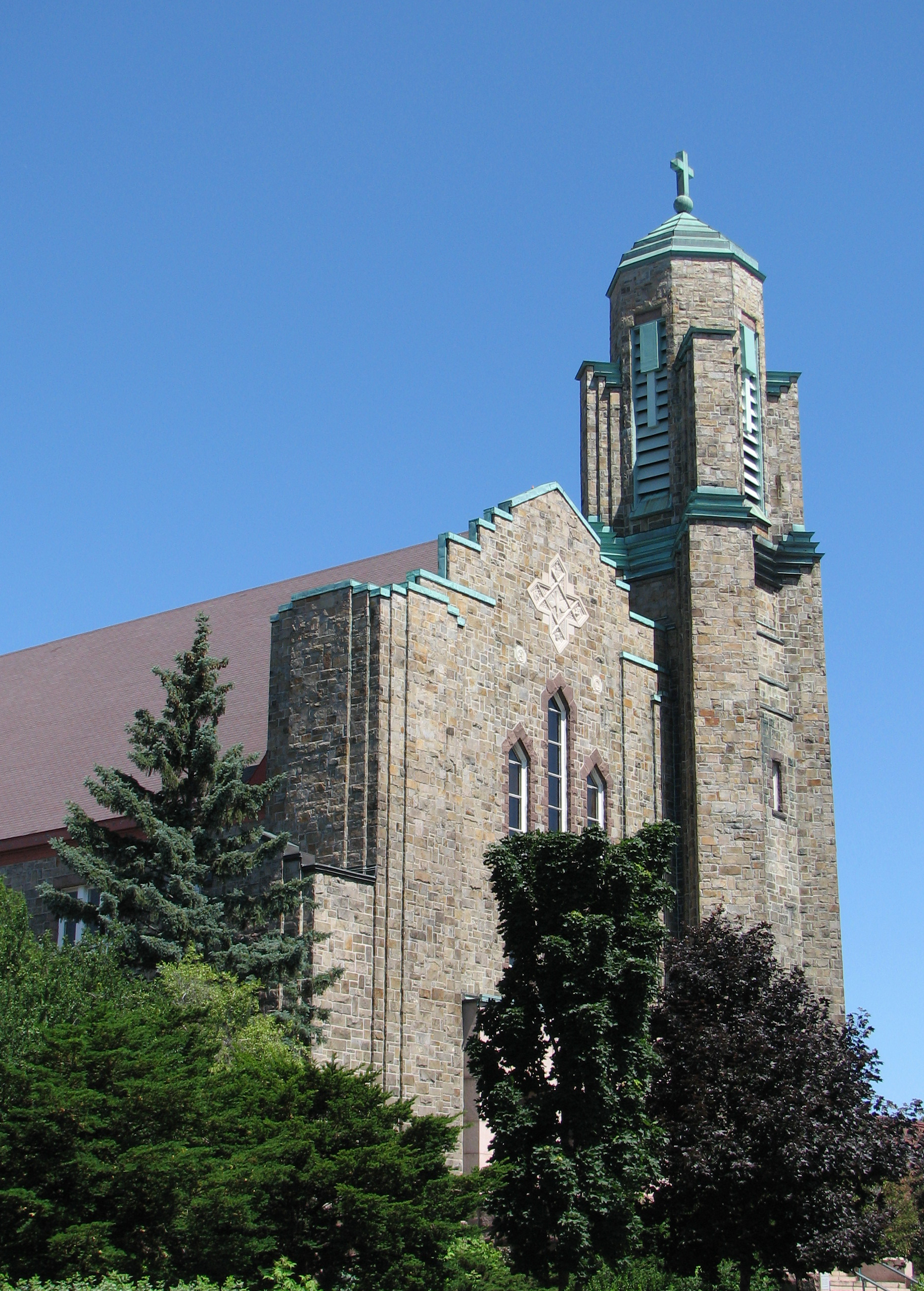 Église Saint-Jean-Berchmans à Montréal